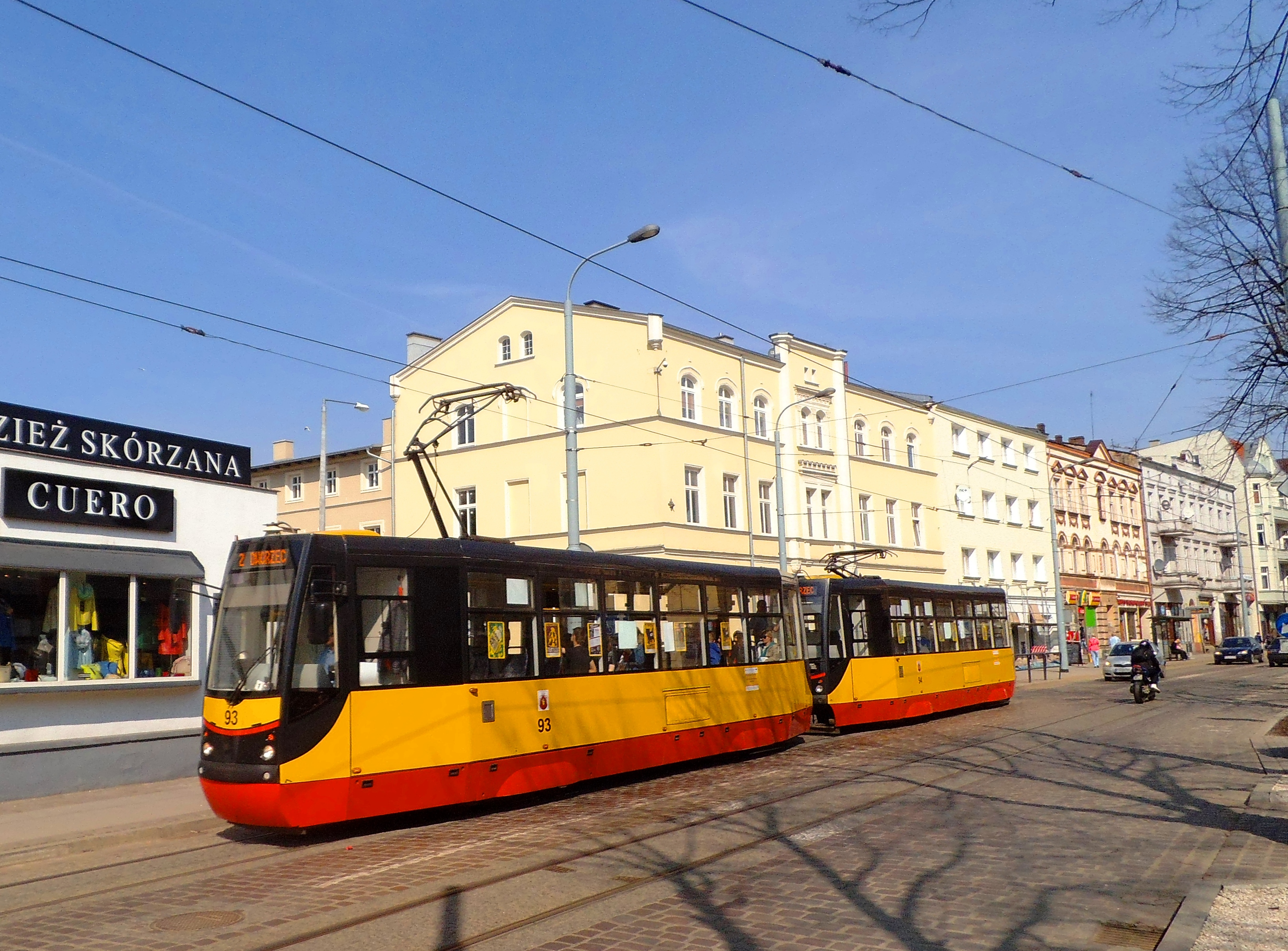 onstal 805Na-MM na ul. Legionów w Grudziądzu